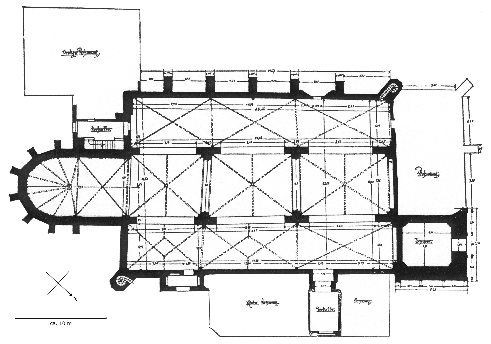 St.Martini-Kirche in Bremen. Grundriß nach dem Umbau zur Hallenkirche (13./14.Jh.)